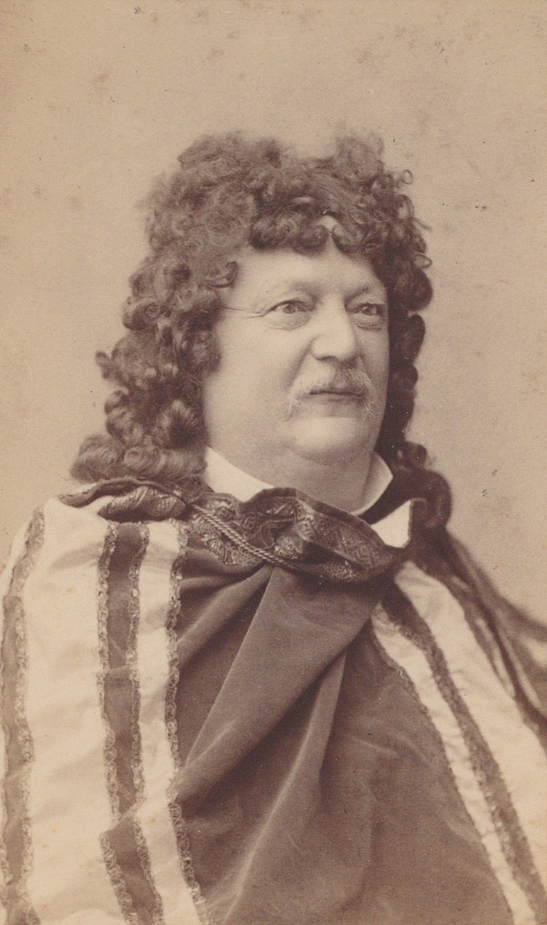 Conrad Ferdinand Meyer im Kostüm